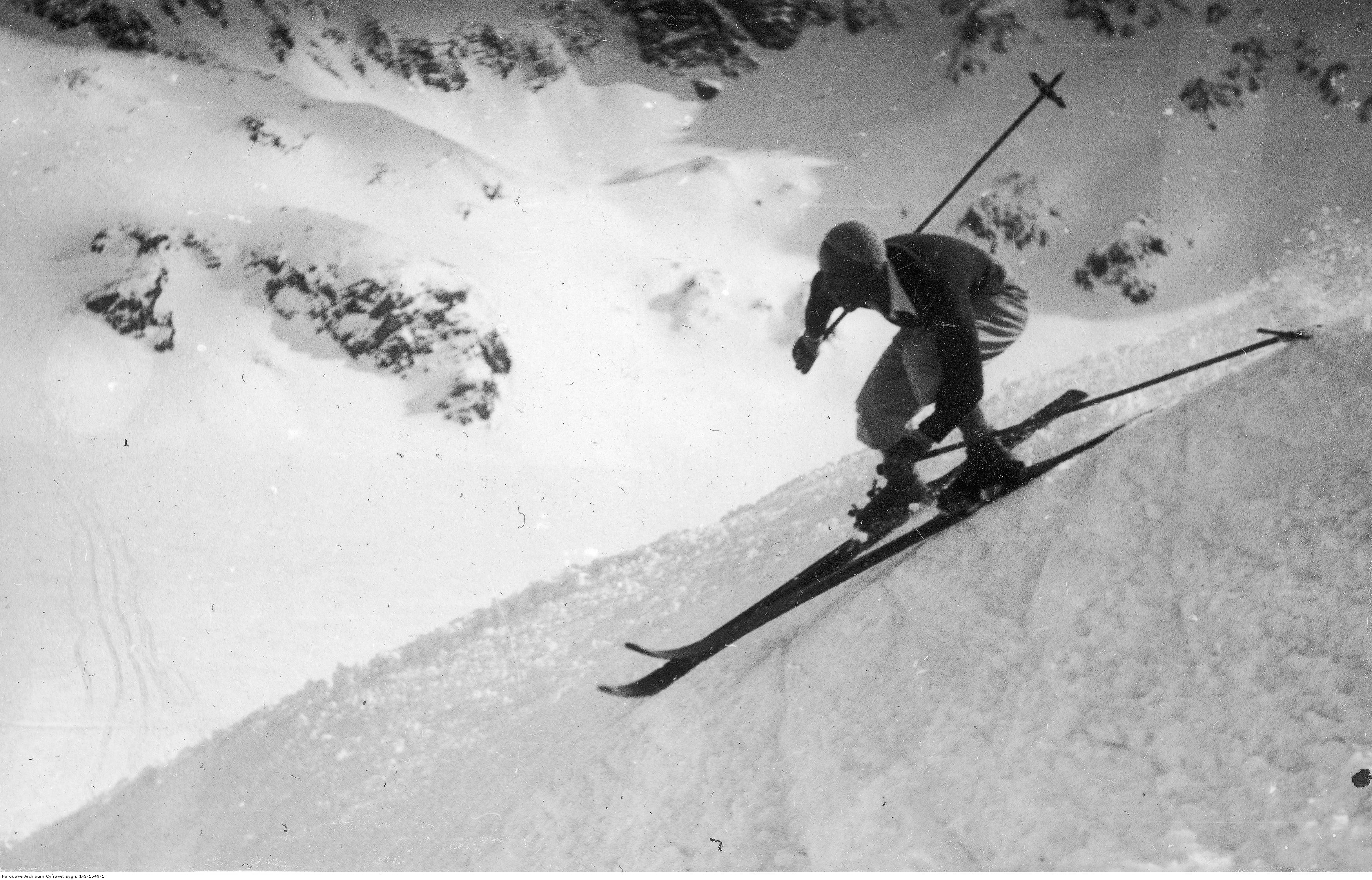 Narciarskie mistrzostwa Polski w zjeździe. Bronisław Czech w trakcie zjazdu. 1933-03-11 (Koncern Ilustrowany Kurier Codzienny - Archiwum Ilustracji)